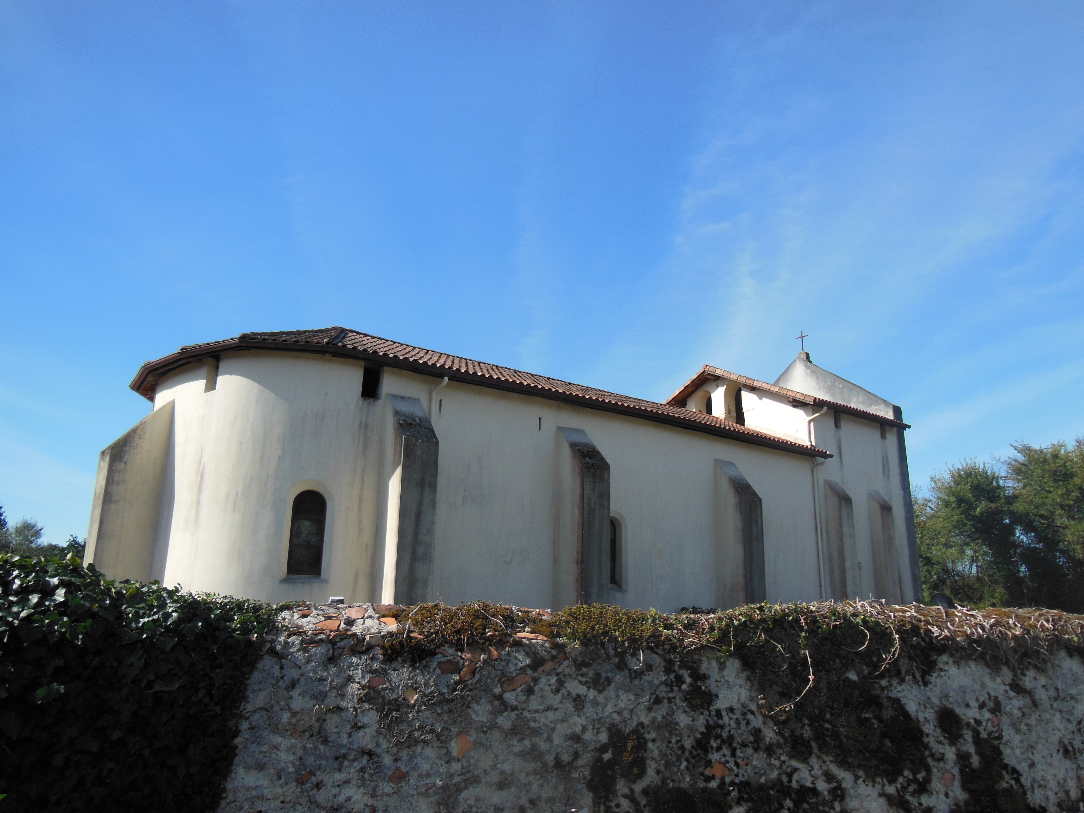 Église Sainte-Marie-Madeleine-et-Saint-Blaise de Sindères, dans le département français des Landes